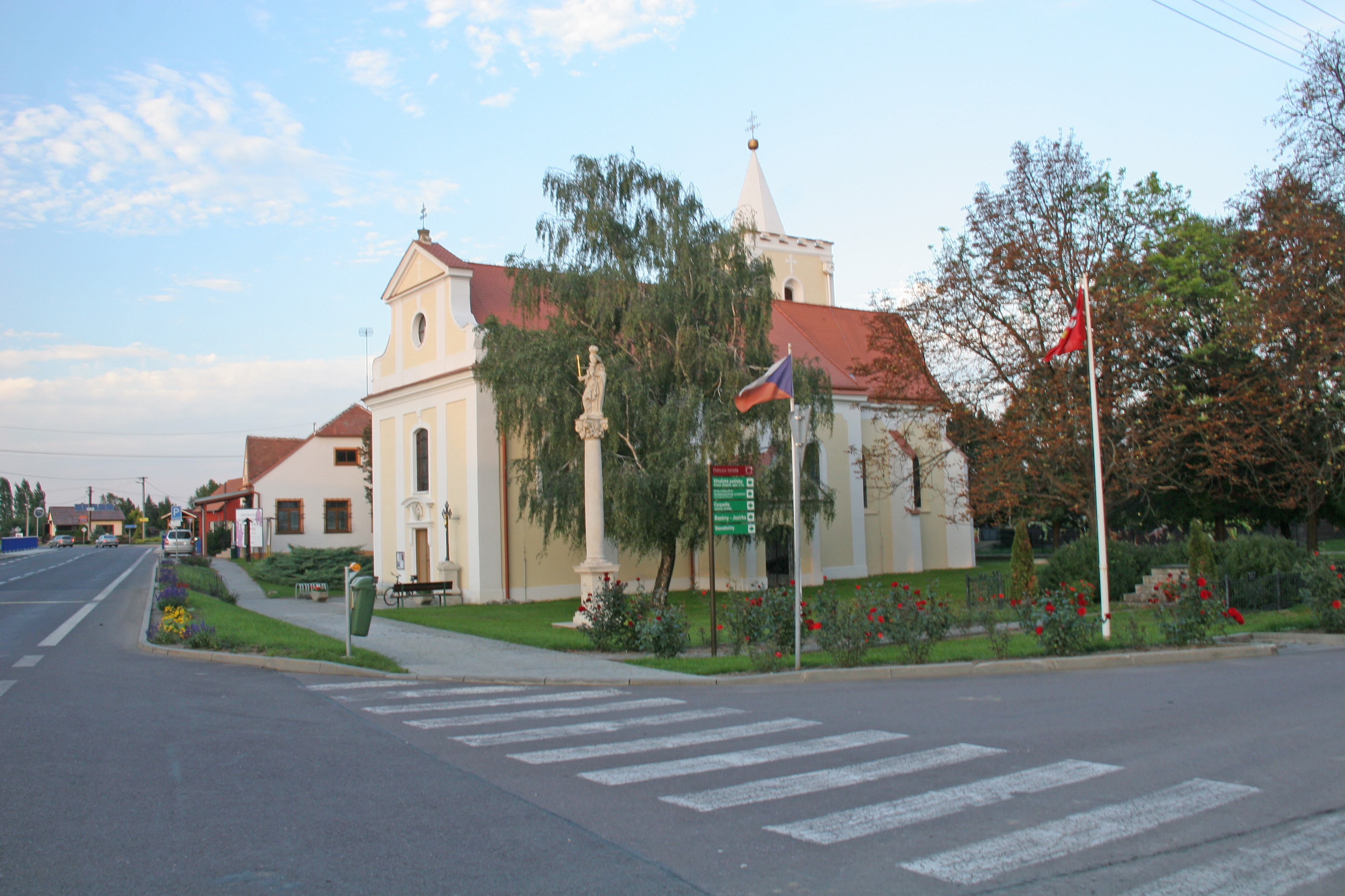 Kostel svaté Markéty, Chvalovice (okres Znojmo).